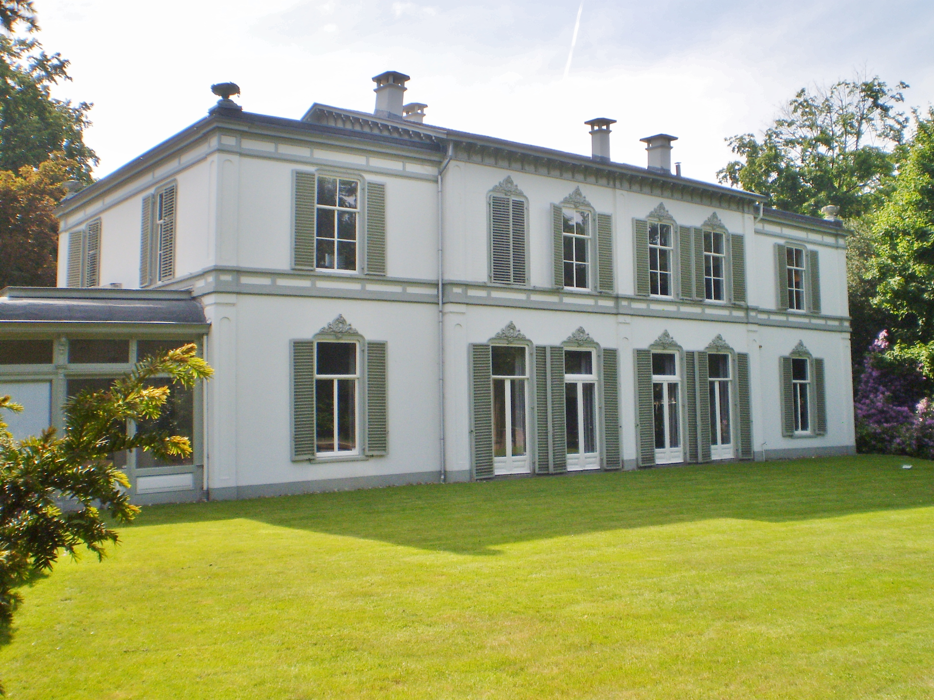 Vanaf de Amsterdamsestraatweg